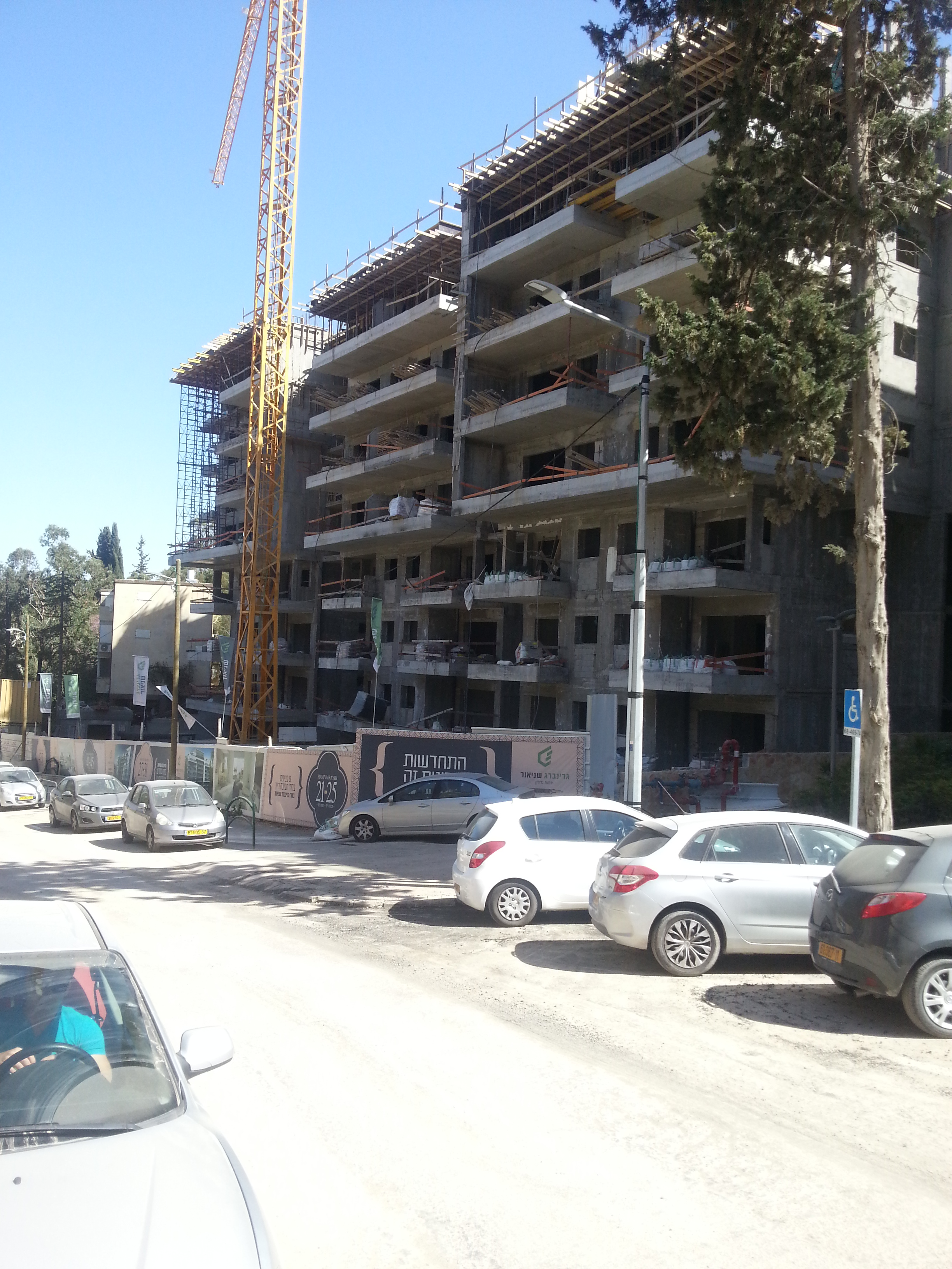 בניין בבנייה במסגרת פרוייקט פינוי-בינוי בשכונת רמוז רמז חיפה. מצד שמאל-בניין המיועד אף הוא להריסה ובנייה מחדש